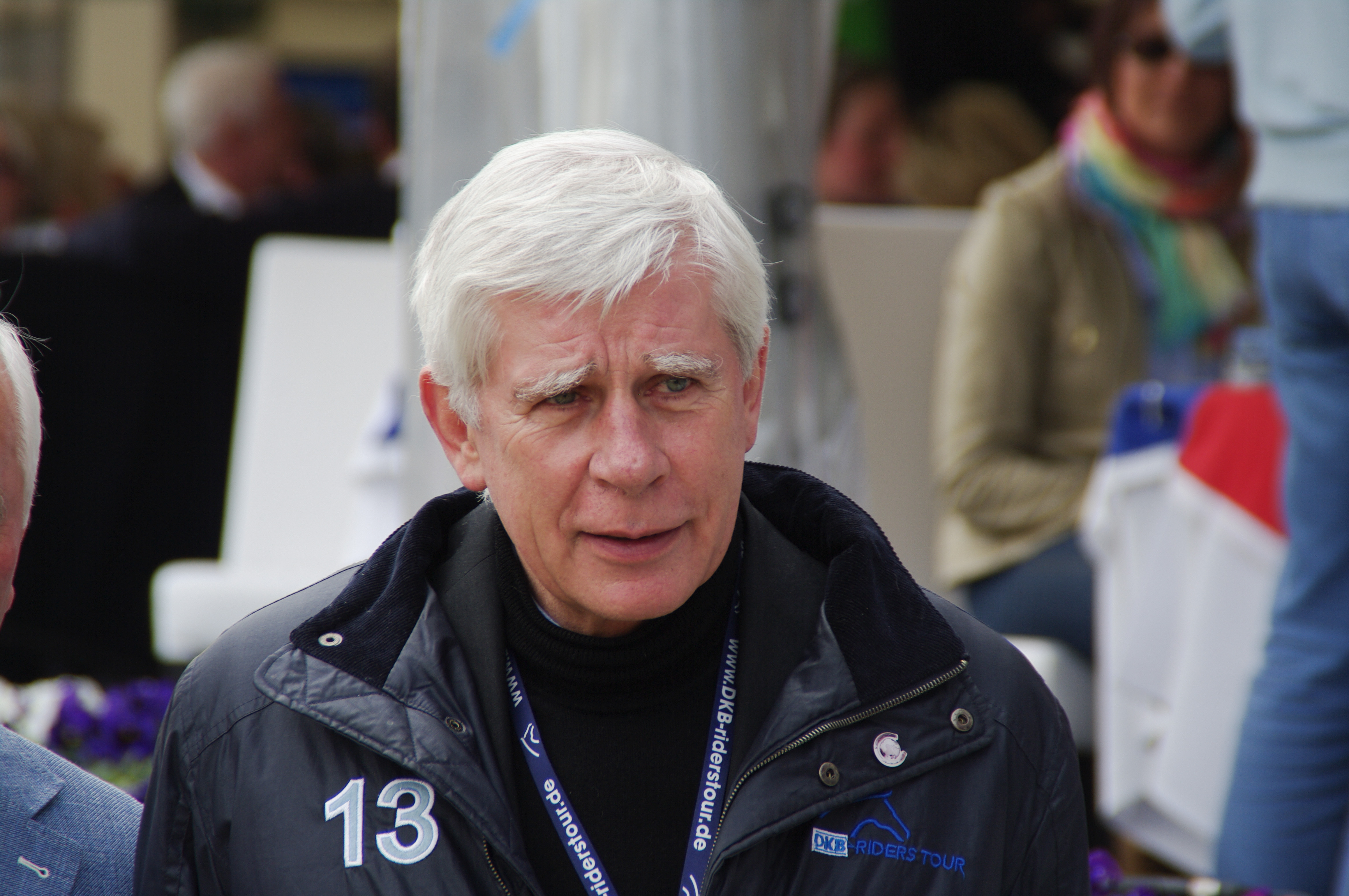 Horses & Dreams